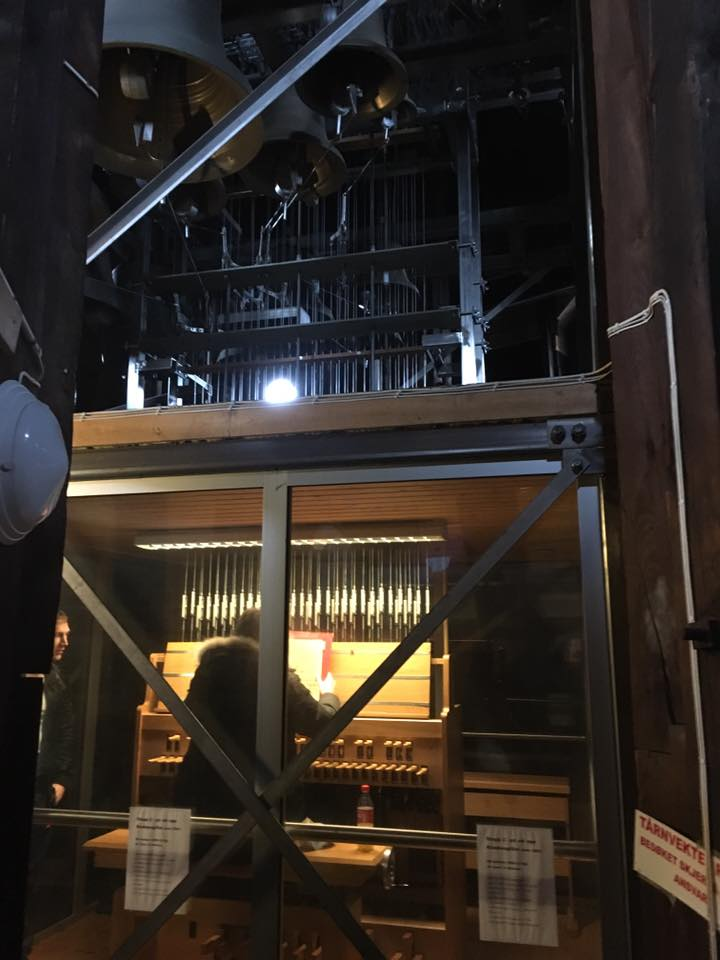 Oslo Domkirke